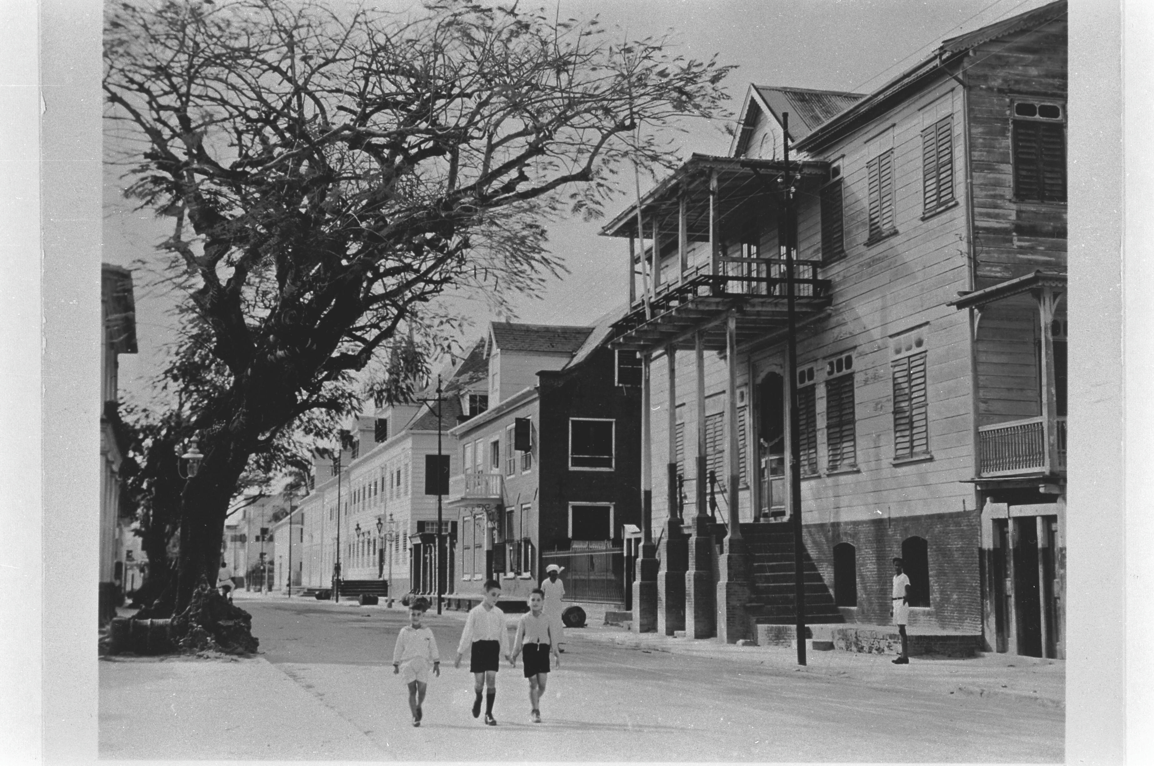 Straatbeeld van Gravenstraat nummer 8, 12 en verderOnderwerp: Straten